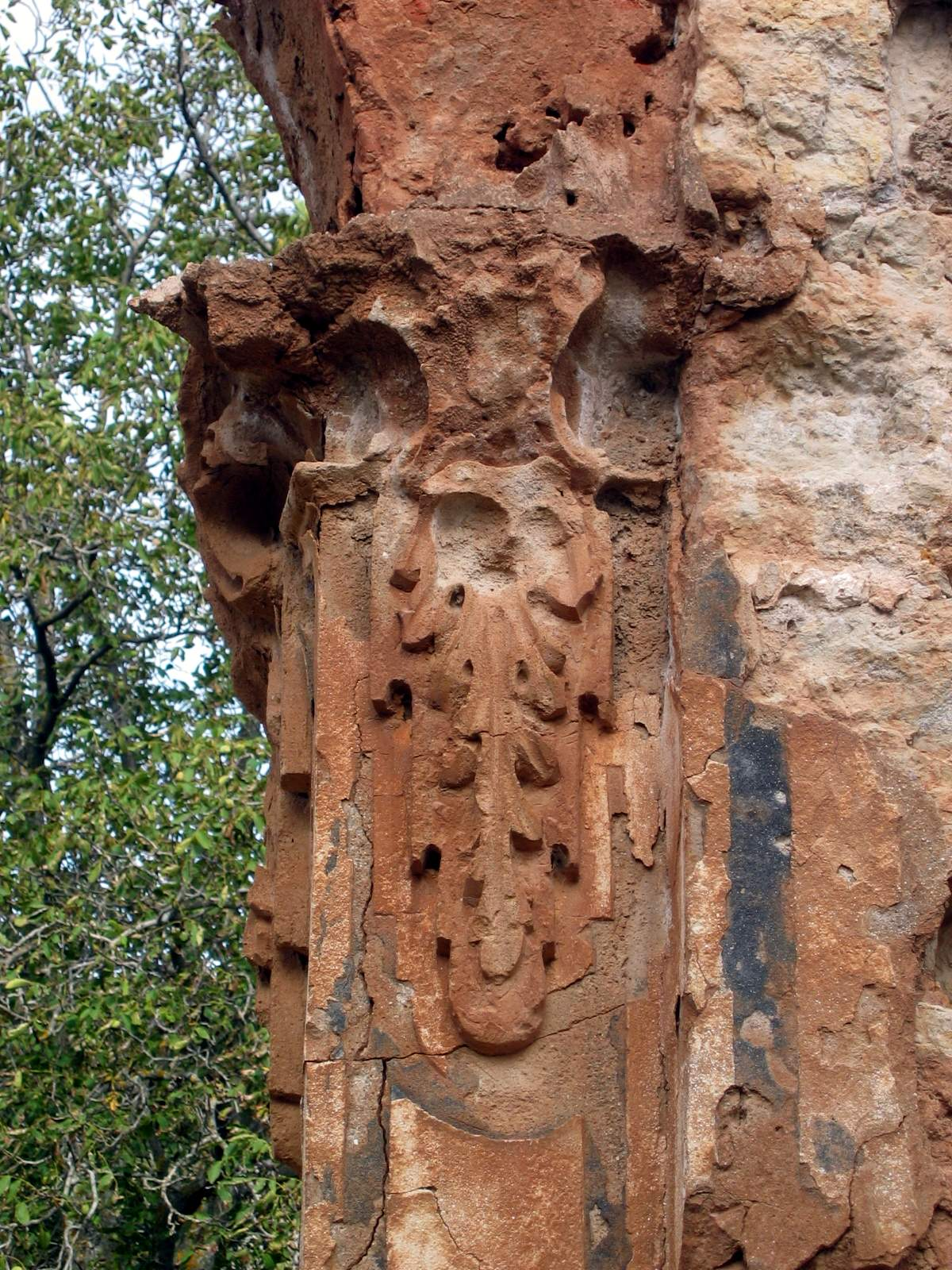 Detalle de las ruinas de la iglesia del Convento de San Guillermo, Castielfabib (Valencia).